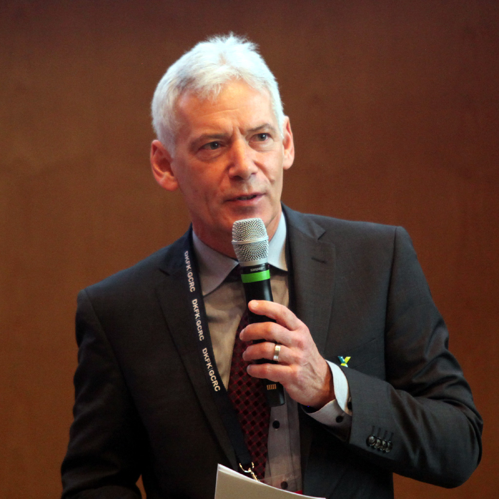 Gerd Nettekoven, Vorstandsvorsitzender der Deutschen Krebshilfe, bei der Eröffnung des 1. Deutschen Krebsforschungskongresses am 4. Februar 2019 in Heidelberg